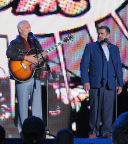 Krzysztof Piasecki i Janusz Rewiński na koncercie Przebojowa Jedynka - inaugurującym sezon jesień'2007 w TVP: program Szkoda gadać.